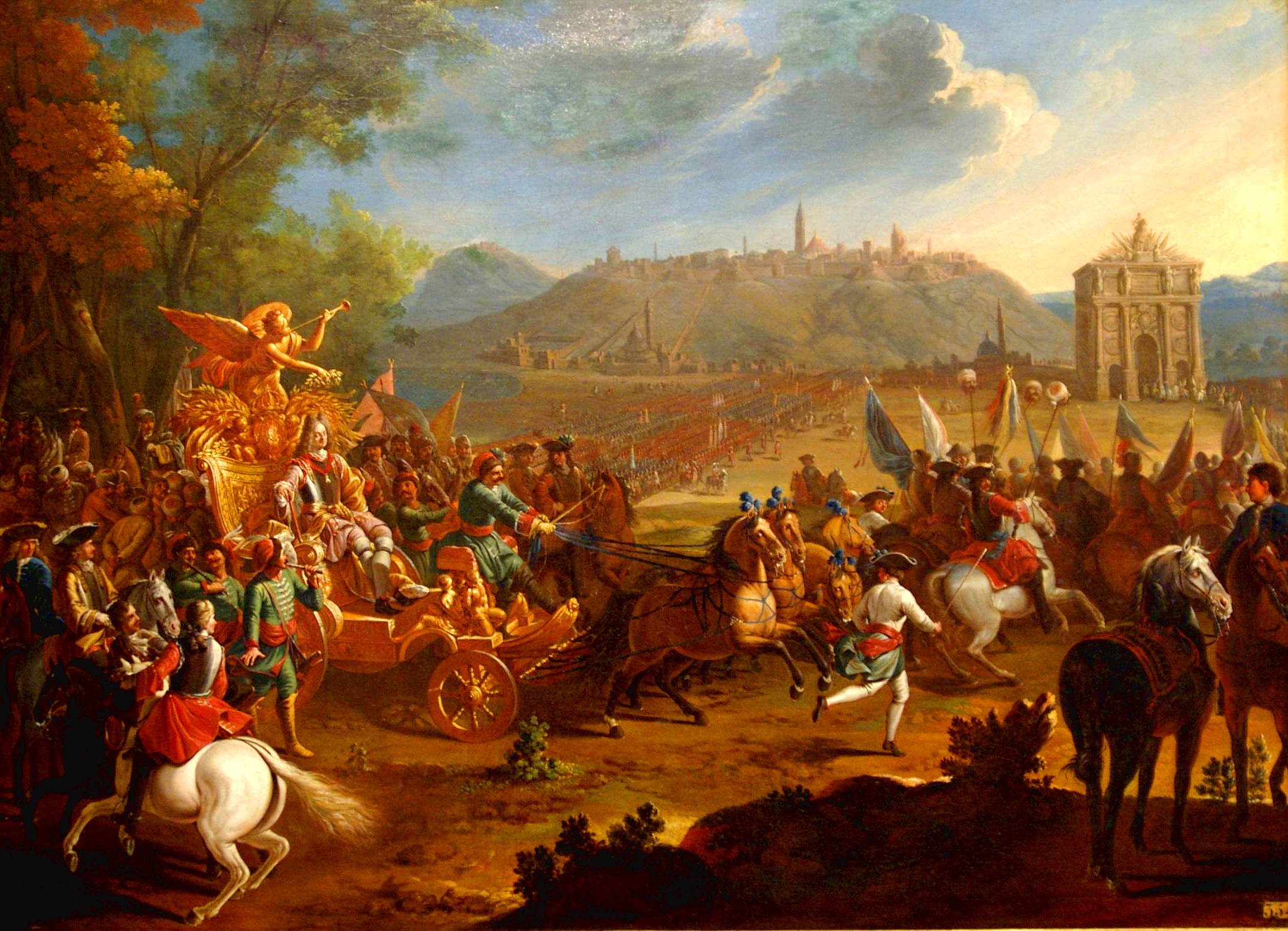 Tableau présenté au Musée Lorrain, dépot du Musée des beaux arts de Nancy depuis 1850 attribué à Charles Herbel.